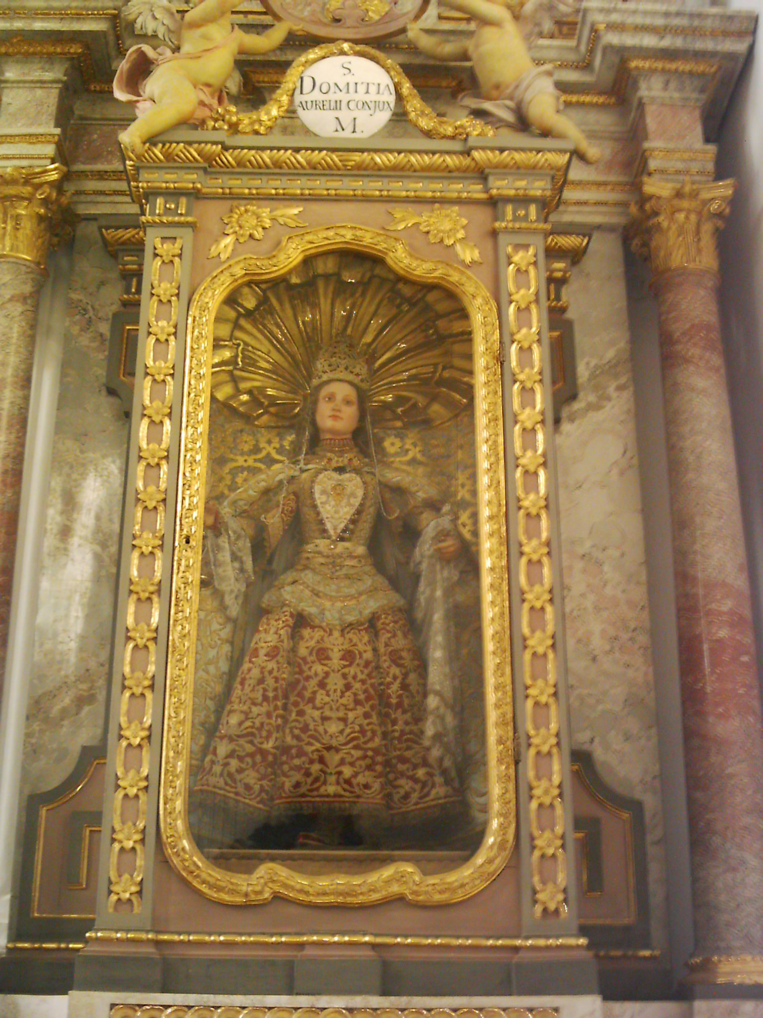 Altar der Hl. Domitia (Märtyrer) in der röm.-kath. Kirche St. Verena in Rot a. d. Rot